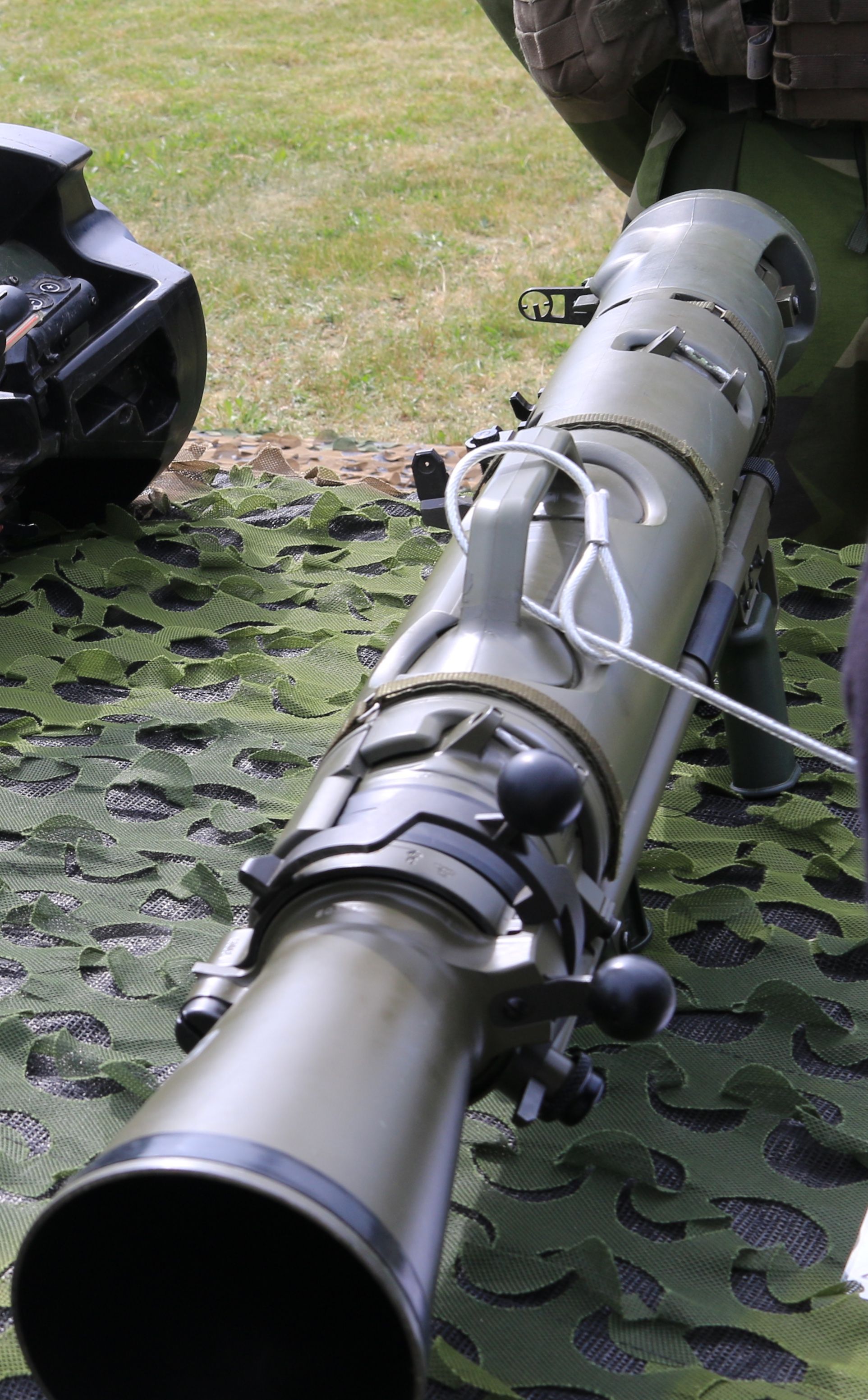 Granatgevär m86 Revinge 2019